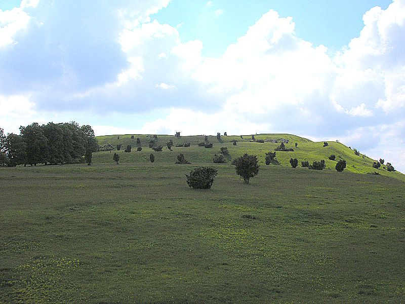 Ipf über Bopfingen (Ostalb, BW). Das gestaffelte Wallsystem der Angriffsseite von der Krone des unteren Walls.